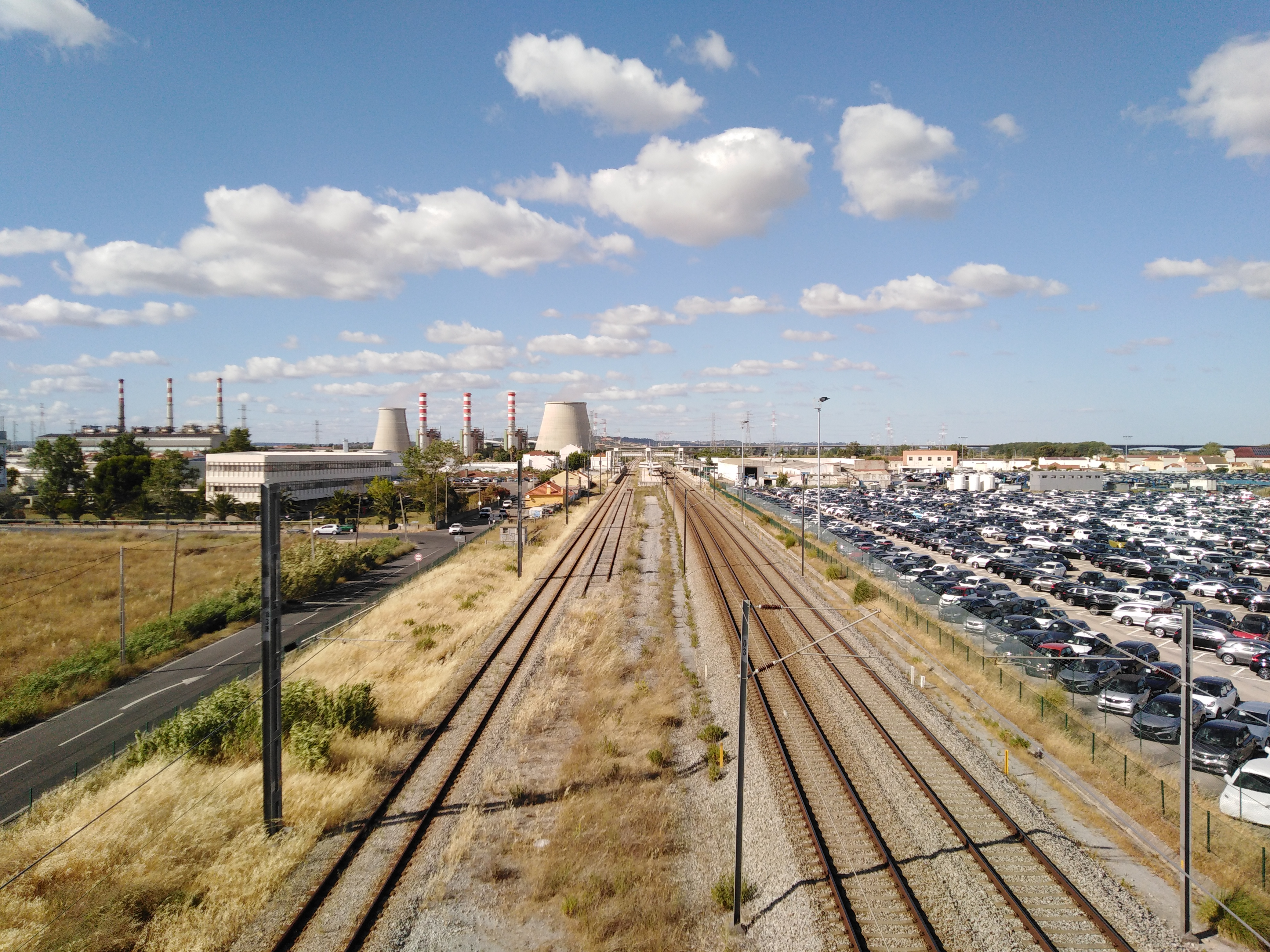 Vista da estação do Carregado a partir de uma passagem superior entre Carregado e Castanheira do Ribatejo. Do lado esquerdo é possível ver também parte da Central Termoelétrica do Carregado